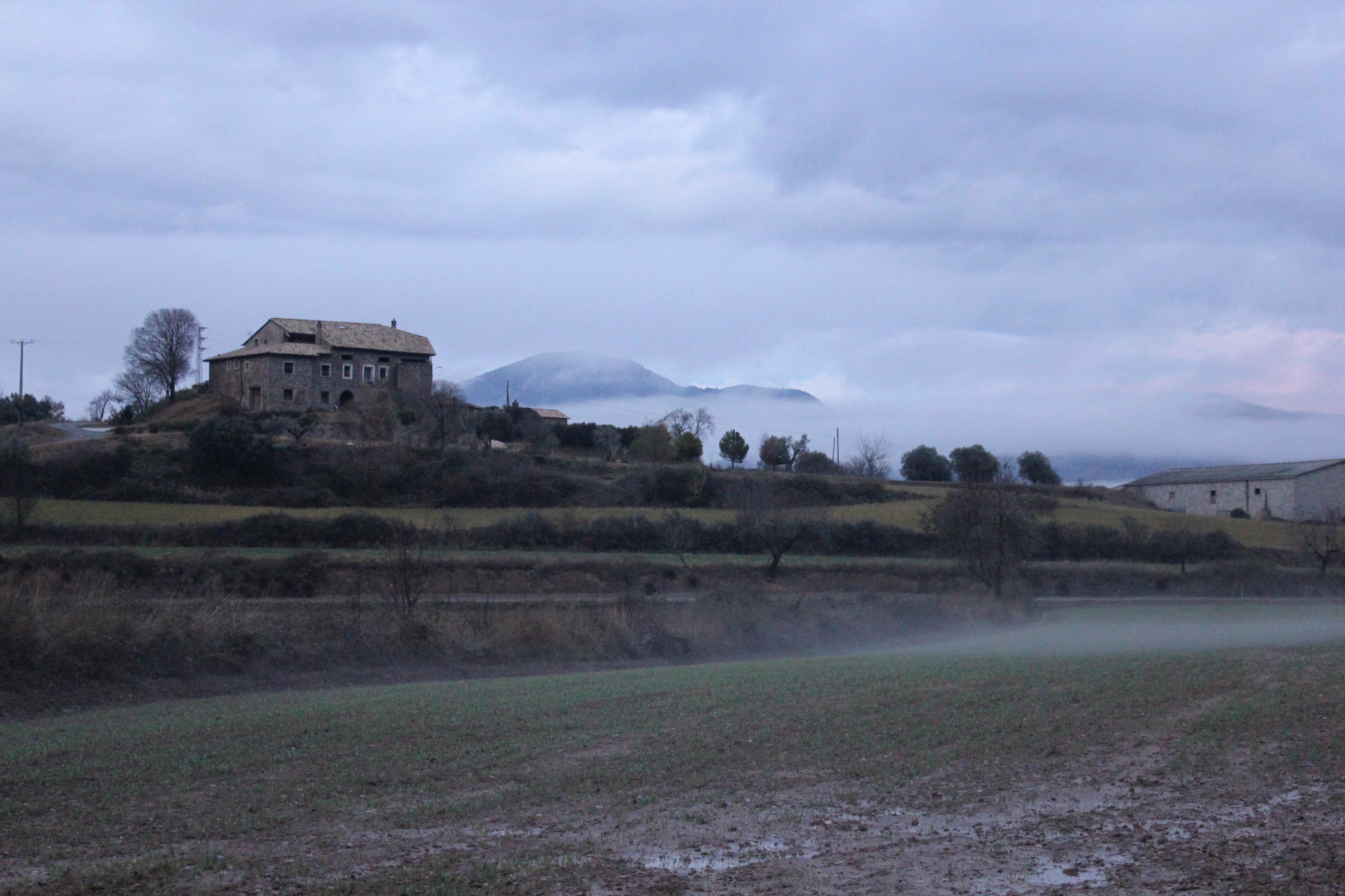 Aragonés: Fendo-se de dia en a valle d'o Susía (Viello Sobrarbe), en hibierno, en Chabierre d'o Elsón.